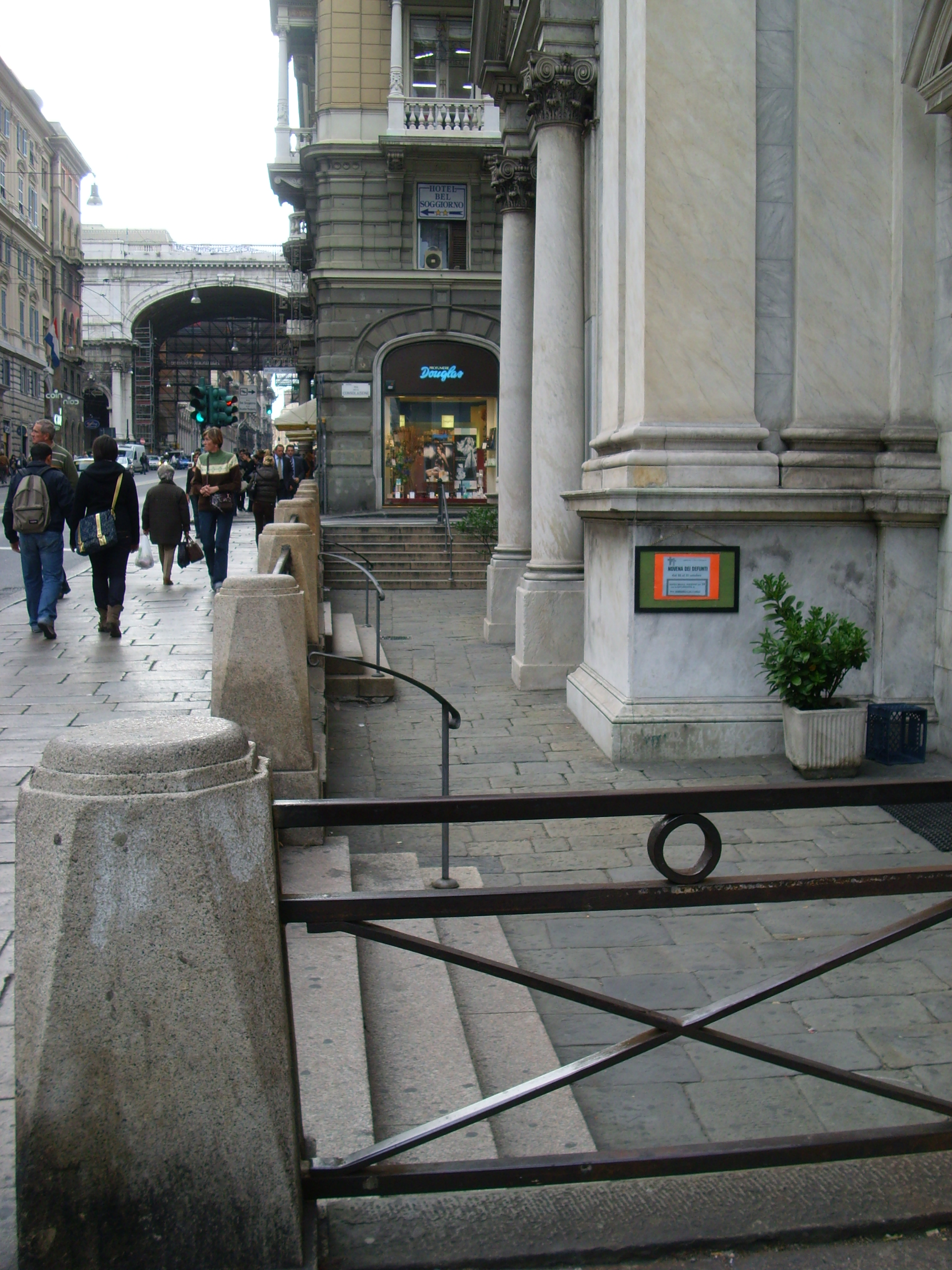 Chiesa della Consolazione, in via XX Settembre, Genova. Particolare dell'ingresso sotto il livello stradale